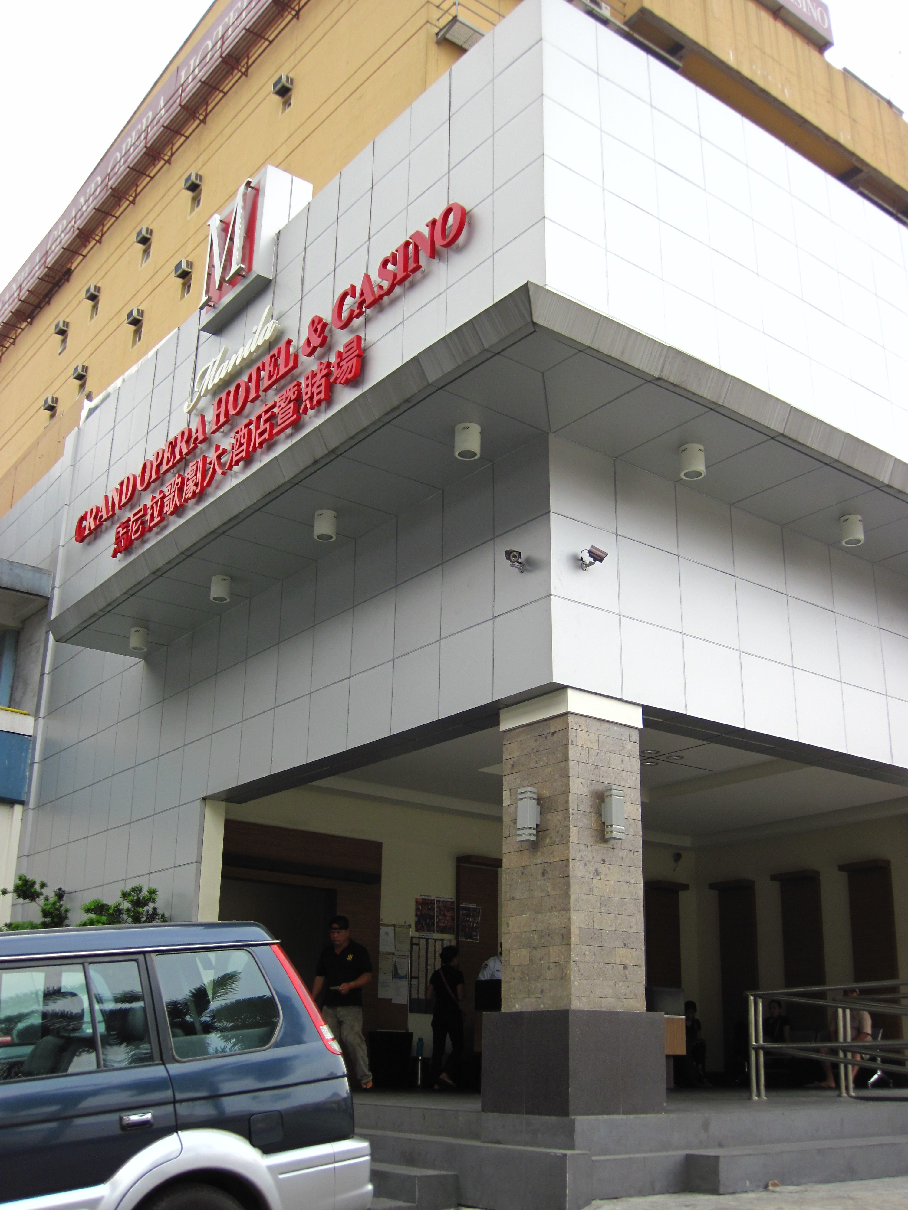 Manila Grand Opera Hotel in Manila, Philippines